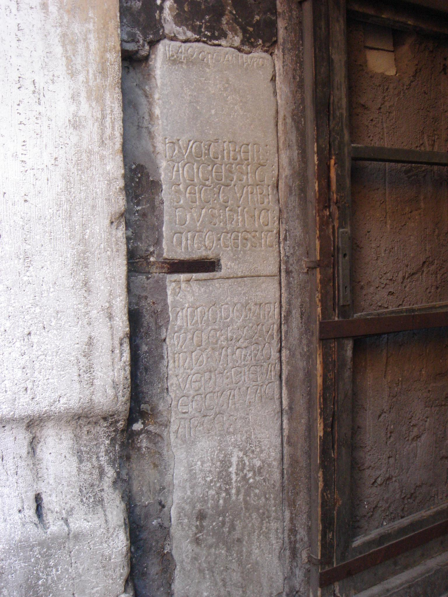 Roma, Arco dei Banchi al rione Ponte: memoria dell'alluvione del Tevere del 5 novembre 1277. Il testo dice: Huc Tyber accessit sed turbidus hinc cito cessit Anno Domini MCCLXXVII Ind VI. M. Novemb. die VII. Eccl a vacante. "Qui arrivò il Tevere, ma torbido; di qui presto si ritirò nell'anno del Signore 1277, sesta indizione, settimo giorno del mese di Novembre; mentre la chiesa era vacante."